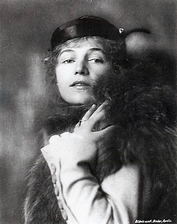 Aud Egede Nissen